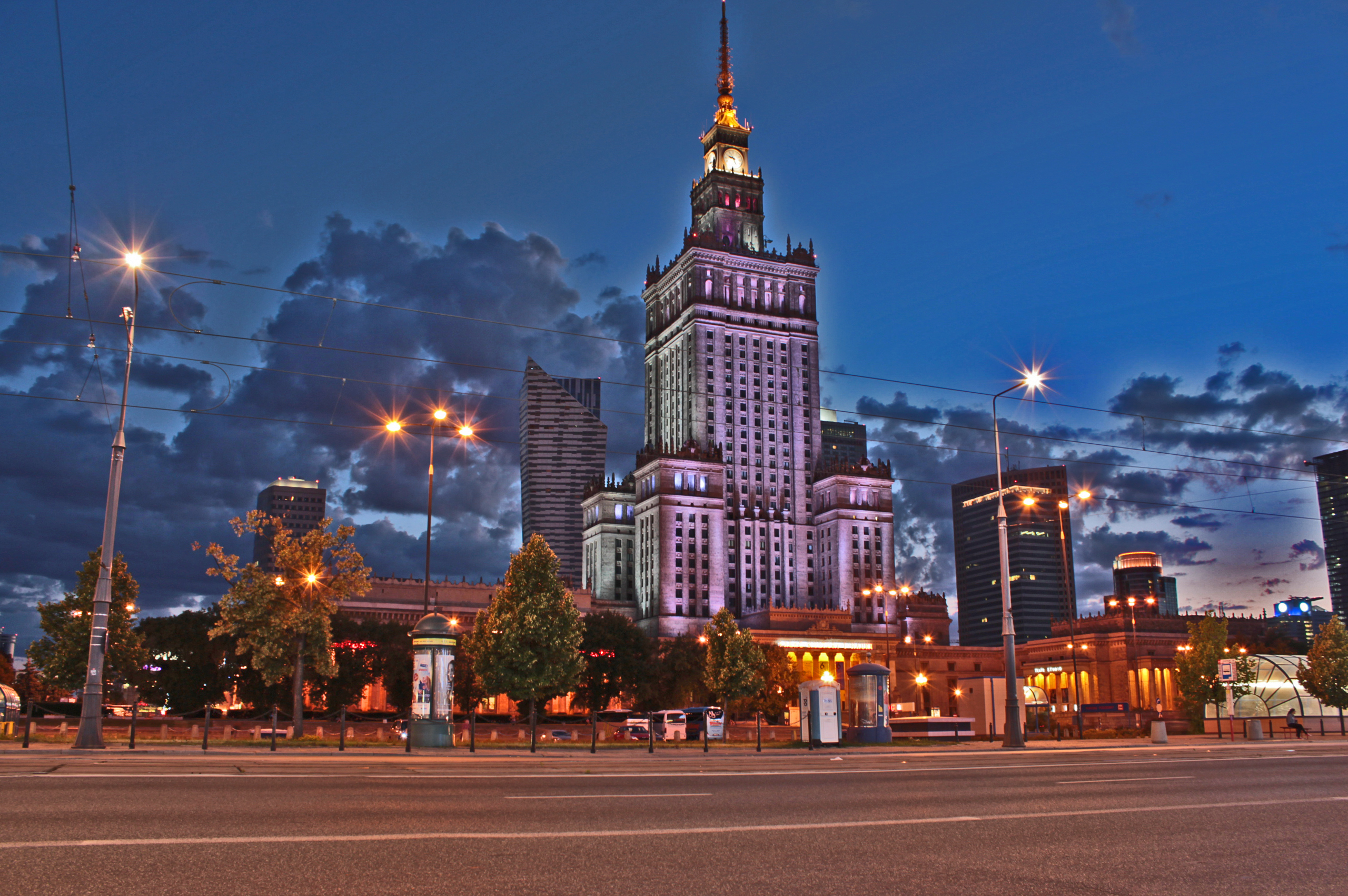 Pałac Kultury i Nauki w Warszawie